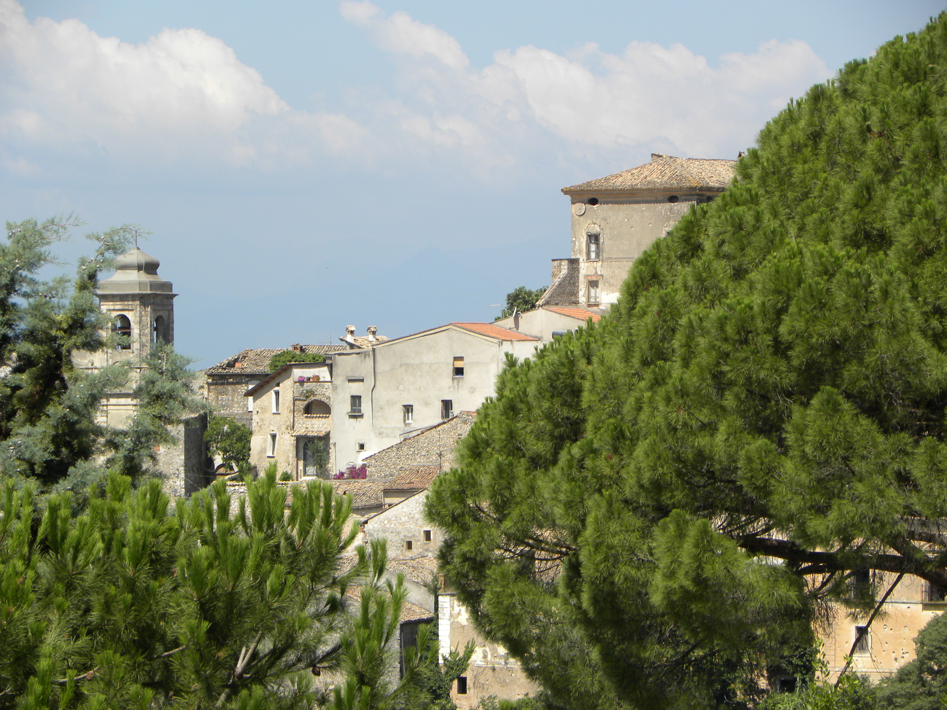 Panorama sul paese storico di Castrocielo.